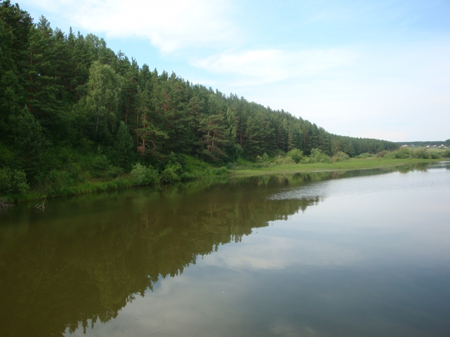 Усть-Каменский пруд